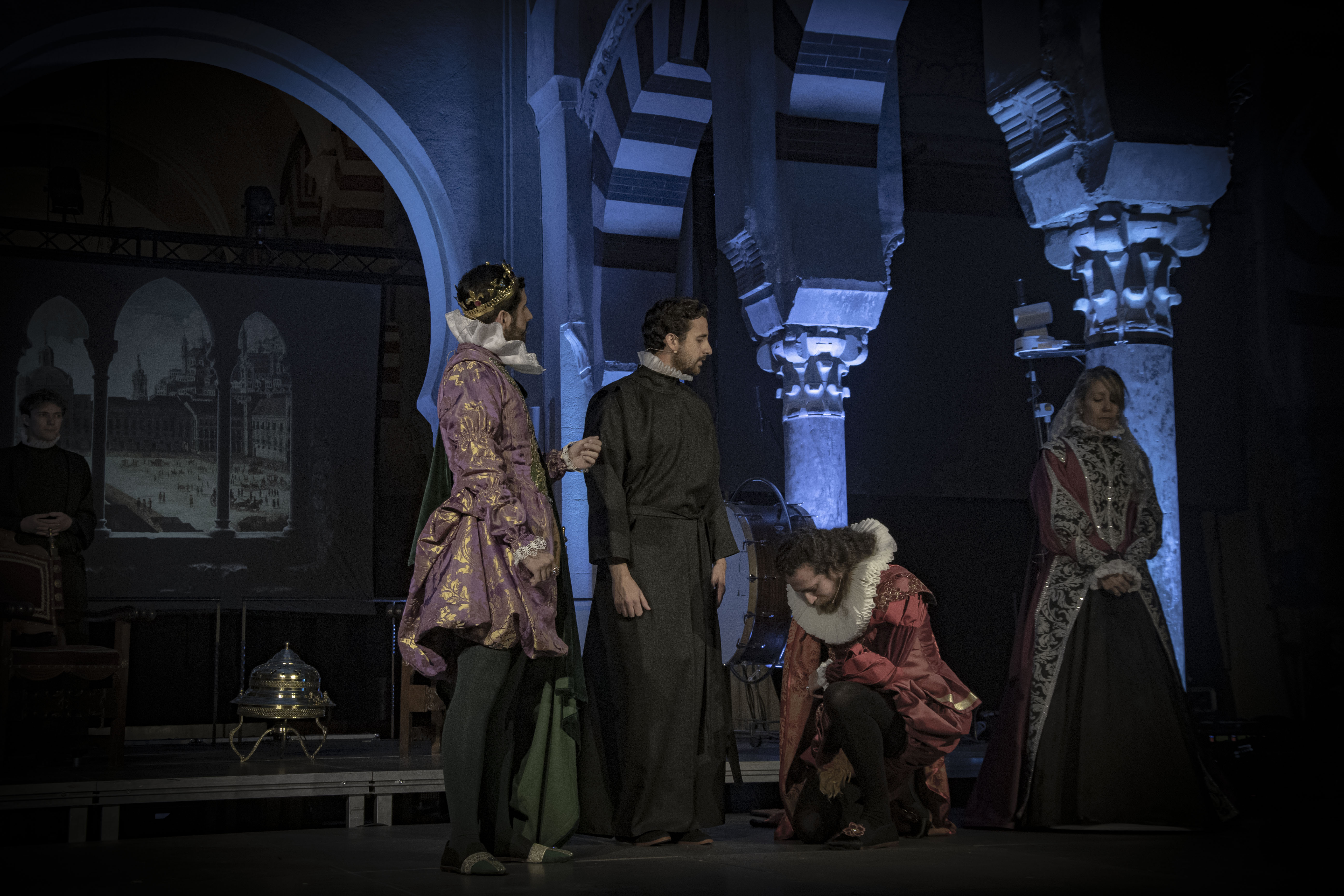 Javier pide al Rey de Portugal permiso para que Atayde pueda viajar con él a Oriente casado con su prometida Dña. Leonor.